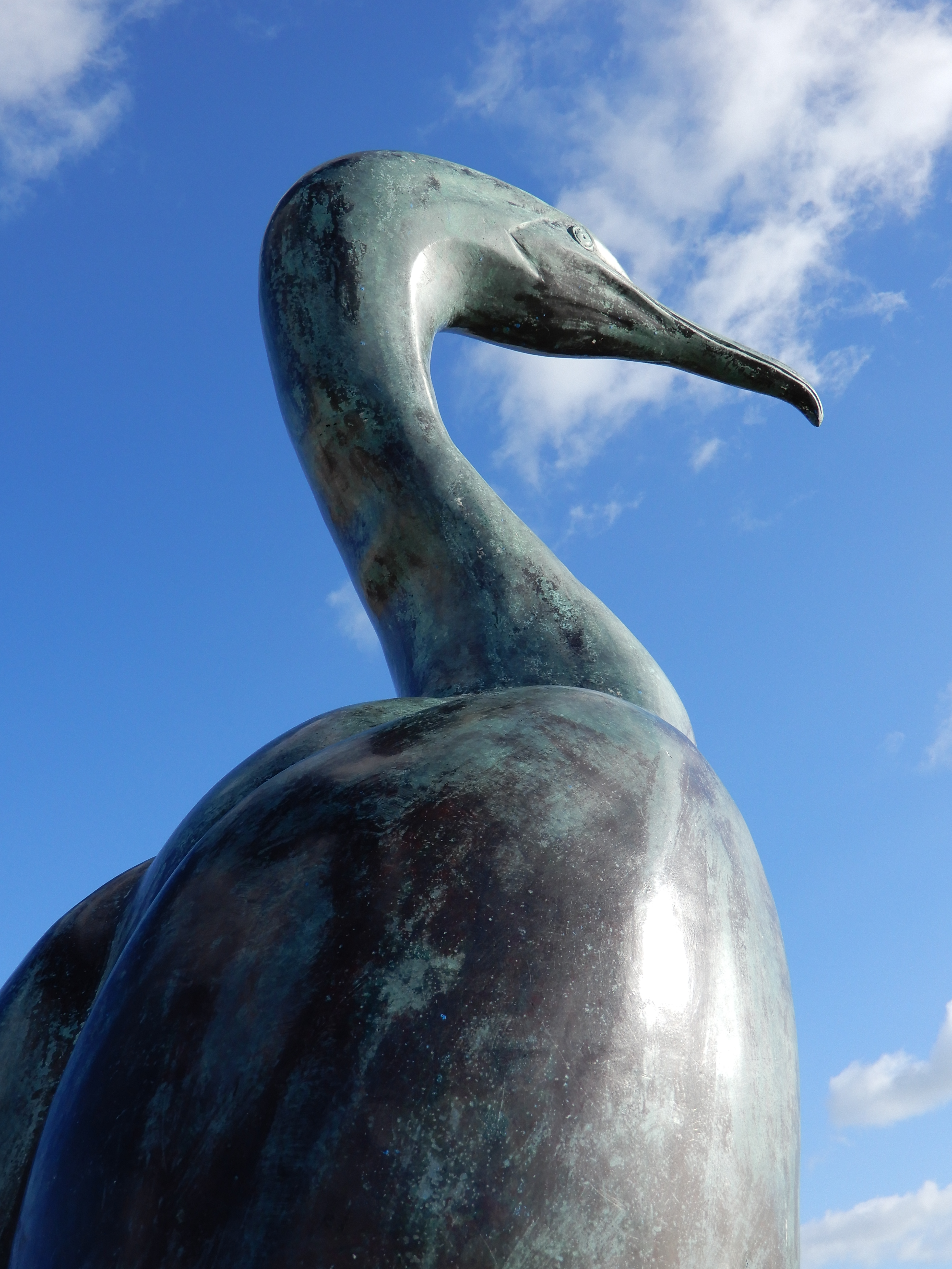 Concarneau - Cormoran sur la corniche